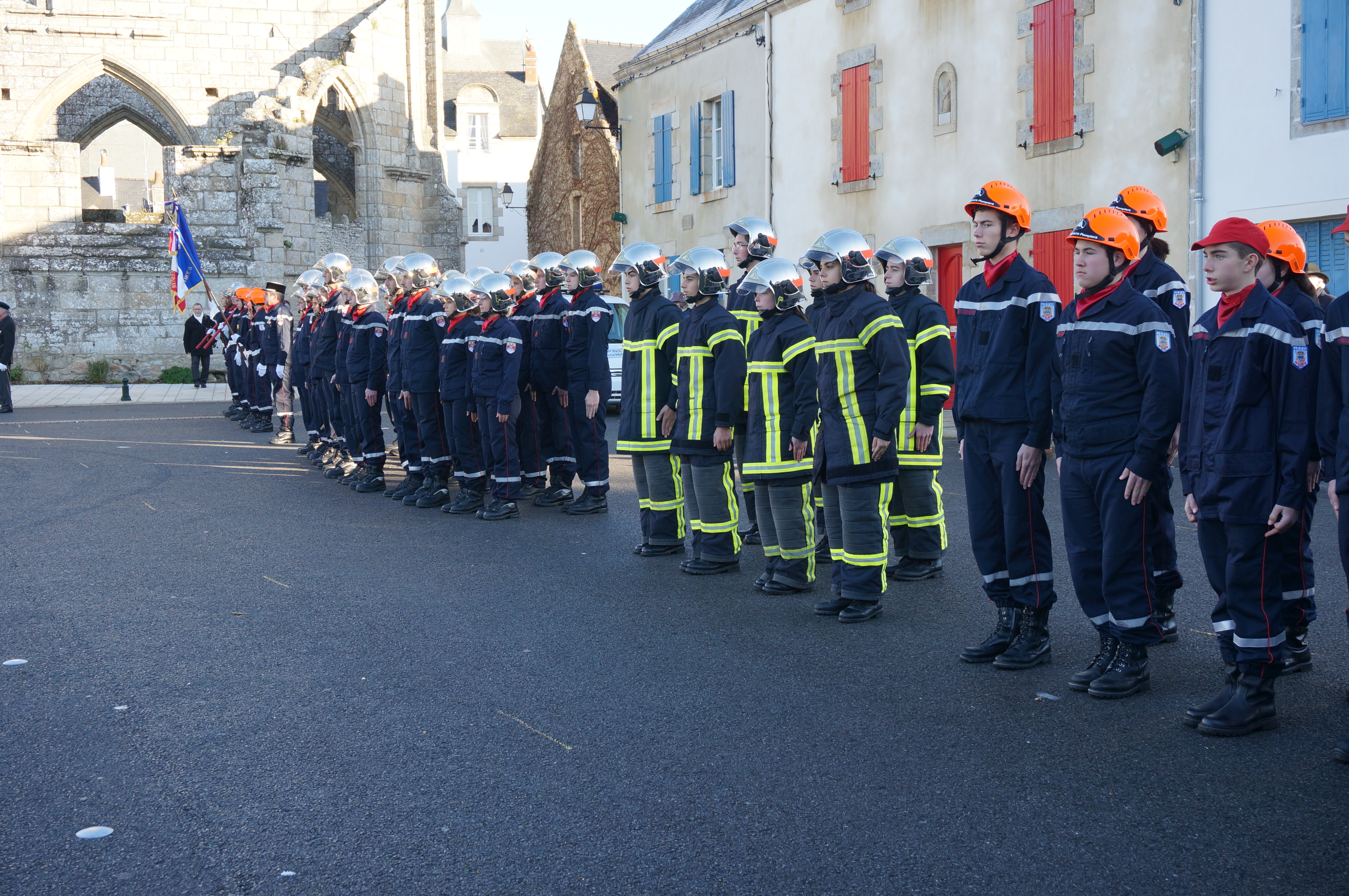 Batz-sur-Mer - Cérémonie de la Sainte Barbe